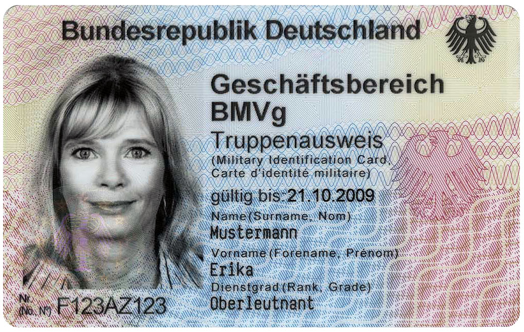 Elektronischer Dienstausweis für deutsche Bundesbehörden (eDA), Truppenausweis BMVg, Vorderseite